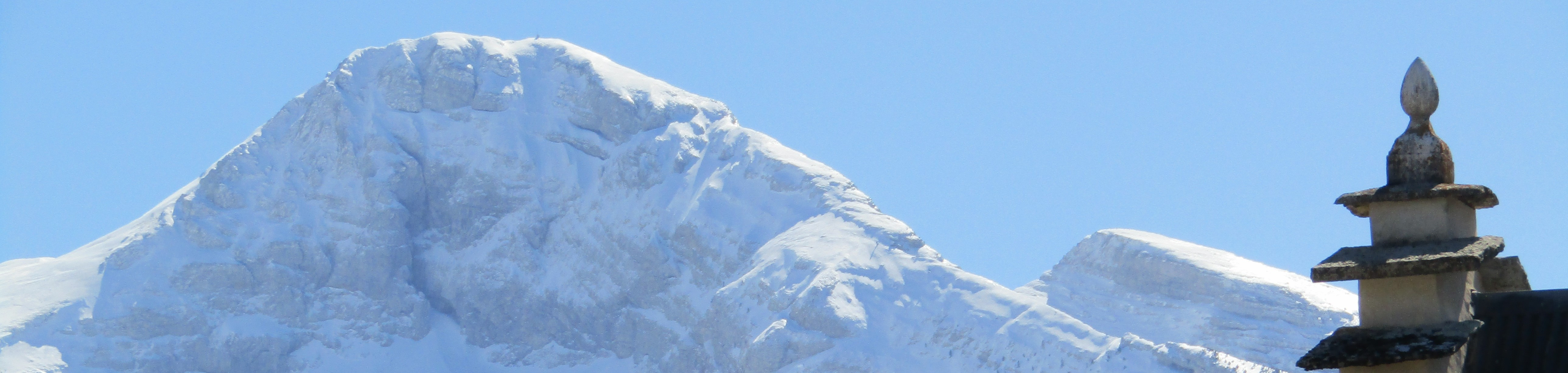 La Grande Moucherolle depuis Villard-de-Lans (5)